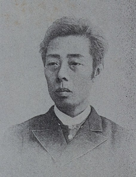 物集高見（1847～1928）